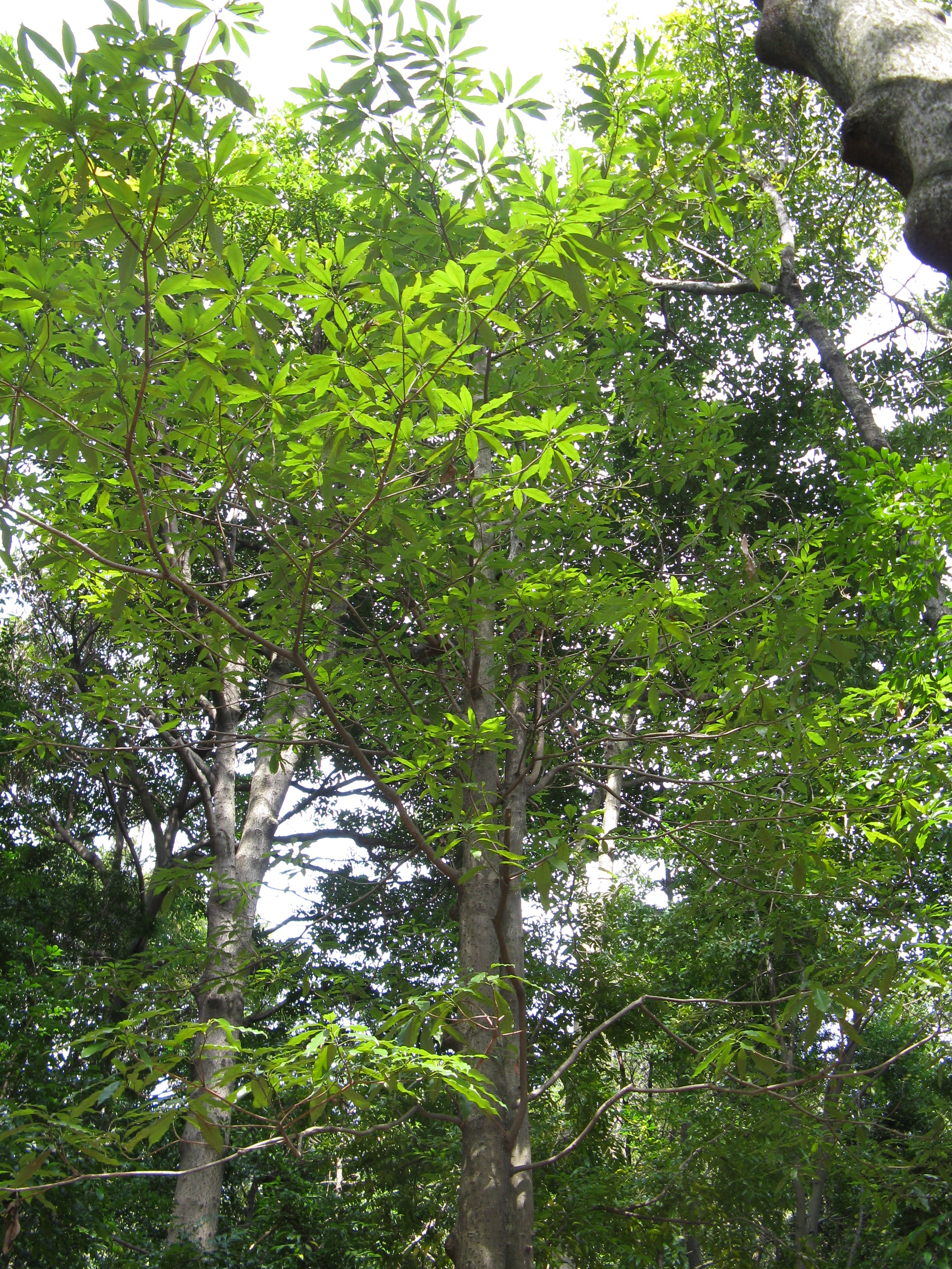 Persea japonica (syn. Machilus japonica)